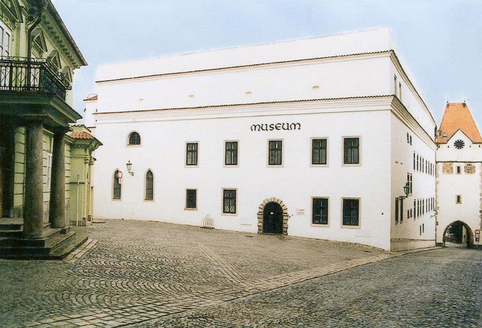 Jindřichův Hradec, Muzeum Jindřichohradecka, budova na Balbínově náměstí